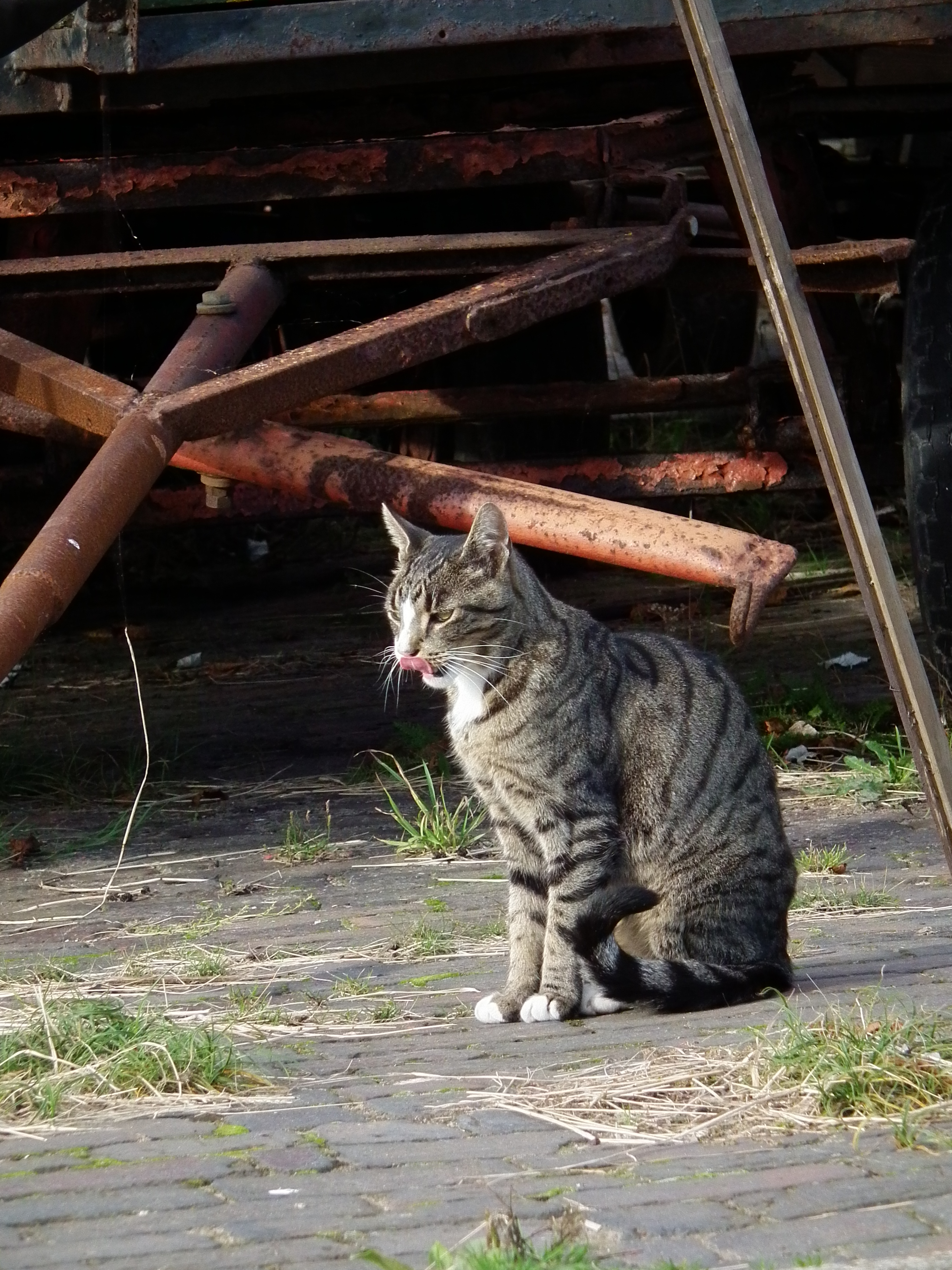 Zierliche Hauskatze, fotografiert auf der ostfriesischen Nordseeinsel Juist (Niedersachsen, Deutschland)